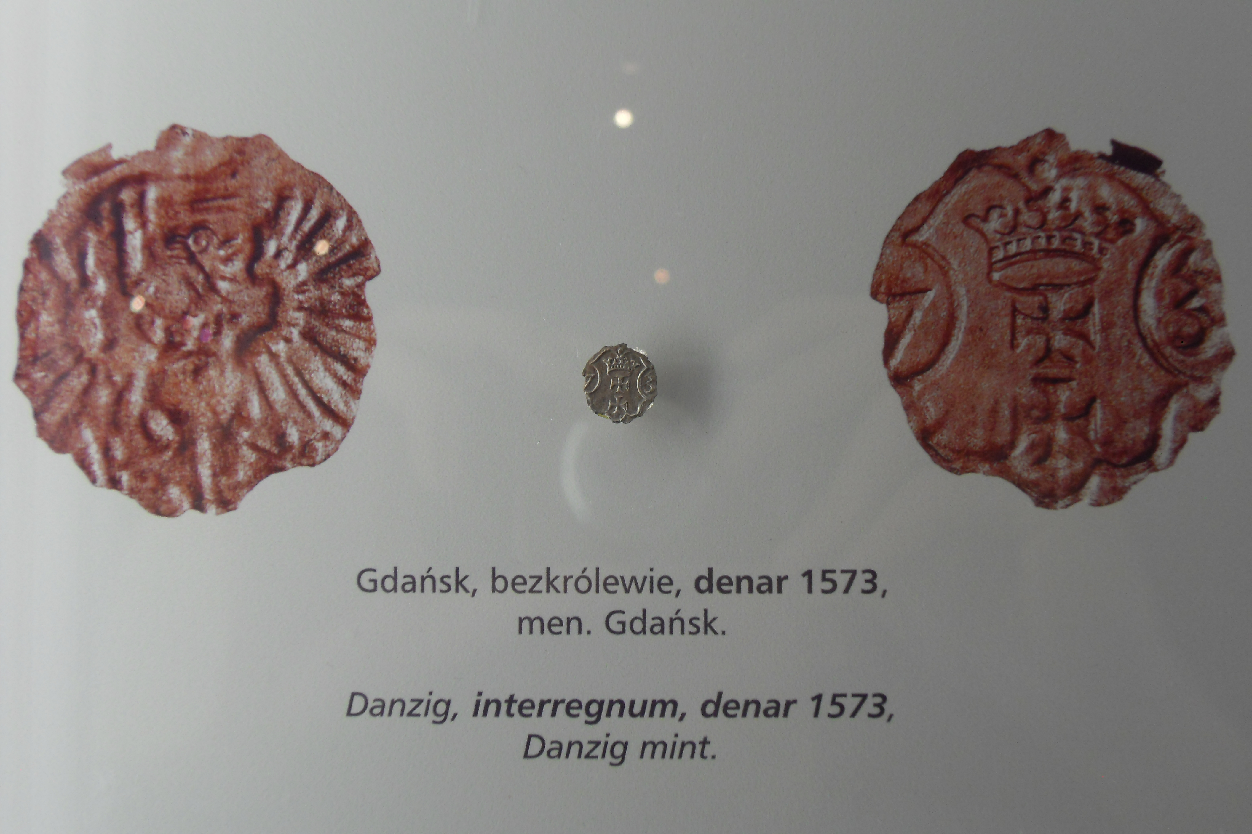 Gdańsk, Wyspa Spichrzów. Ul. Chmielna, spichlerz Błękitny Baranek, zbiory - Gdańsk, bezkrólewie, denar z 1573 r.